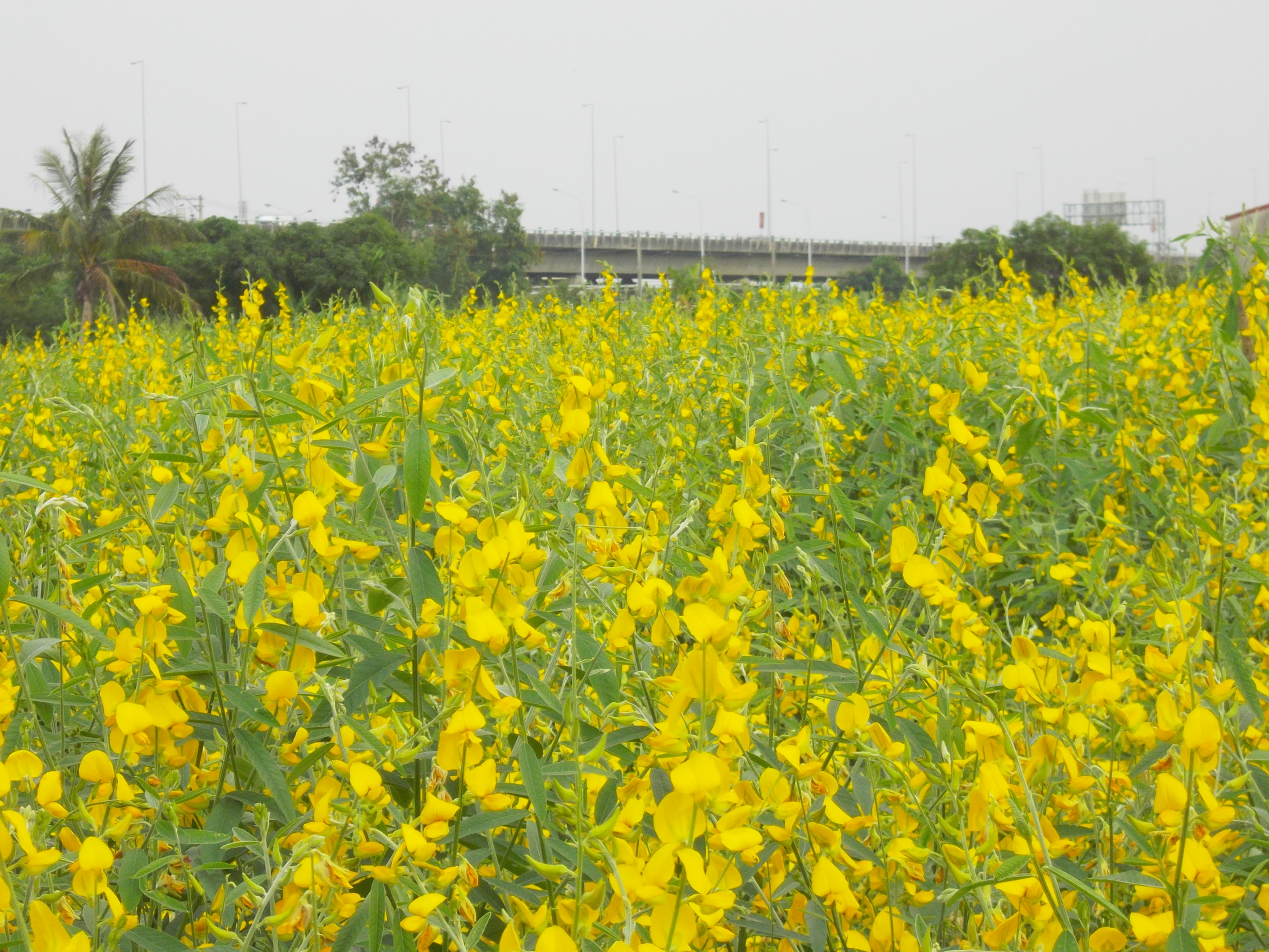 芝麻花開花